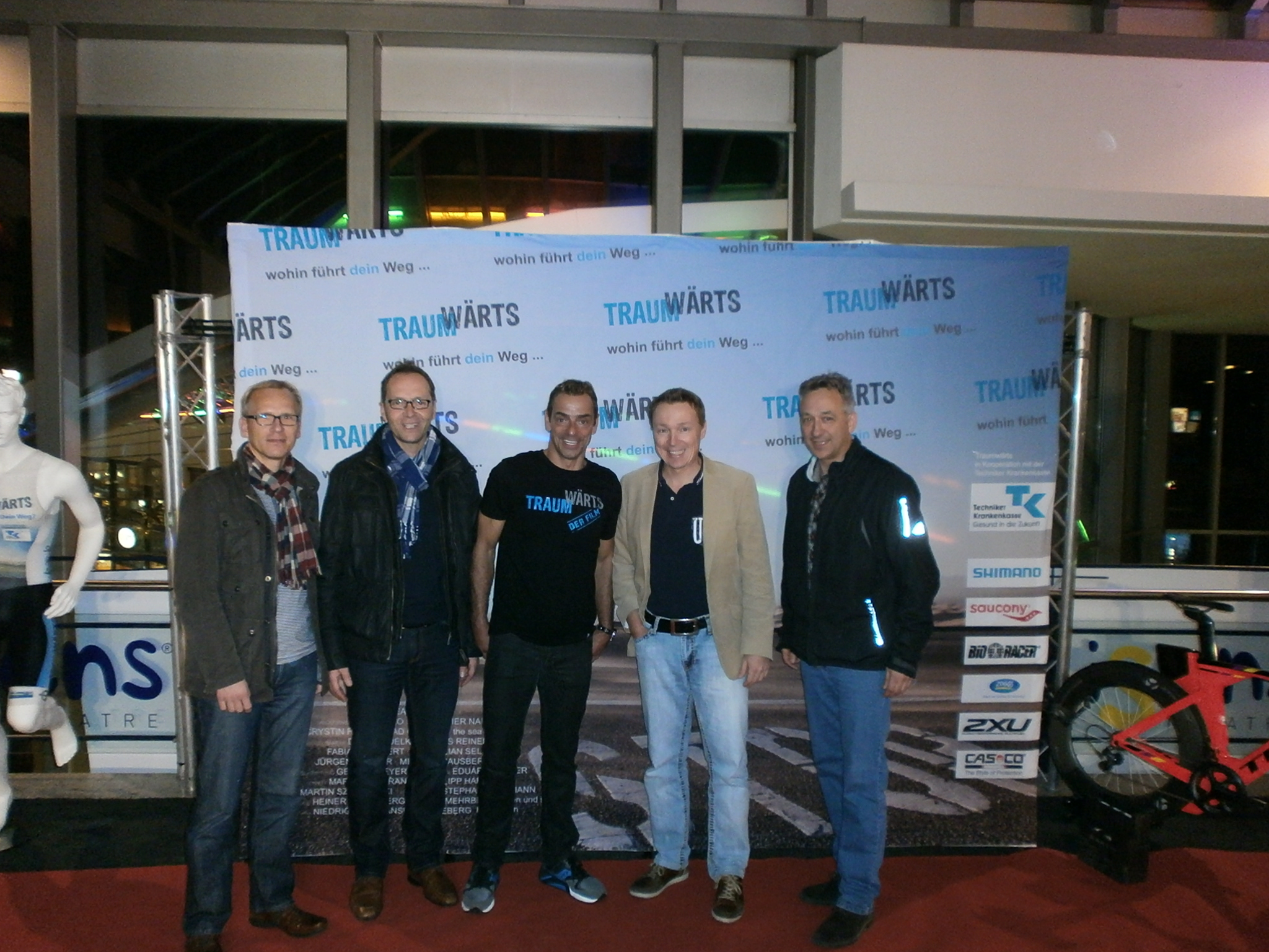 Deutschlandpremiere seines Films Traumwärts in Bochum am 6.11.2013